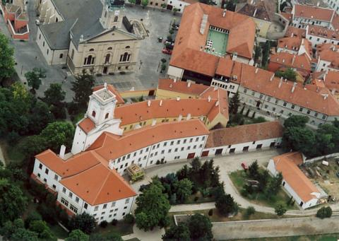 Hrad Püspökvár v Győru v severním Maďarsku